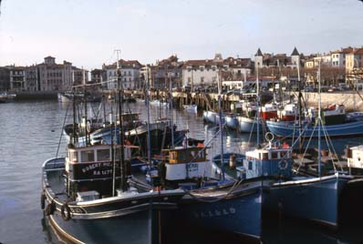 Arrantza-ontziak Donibane Lohizuneko portuan